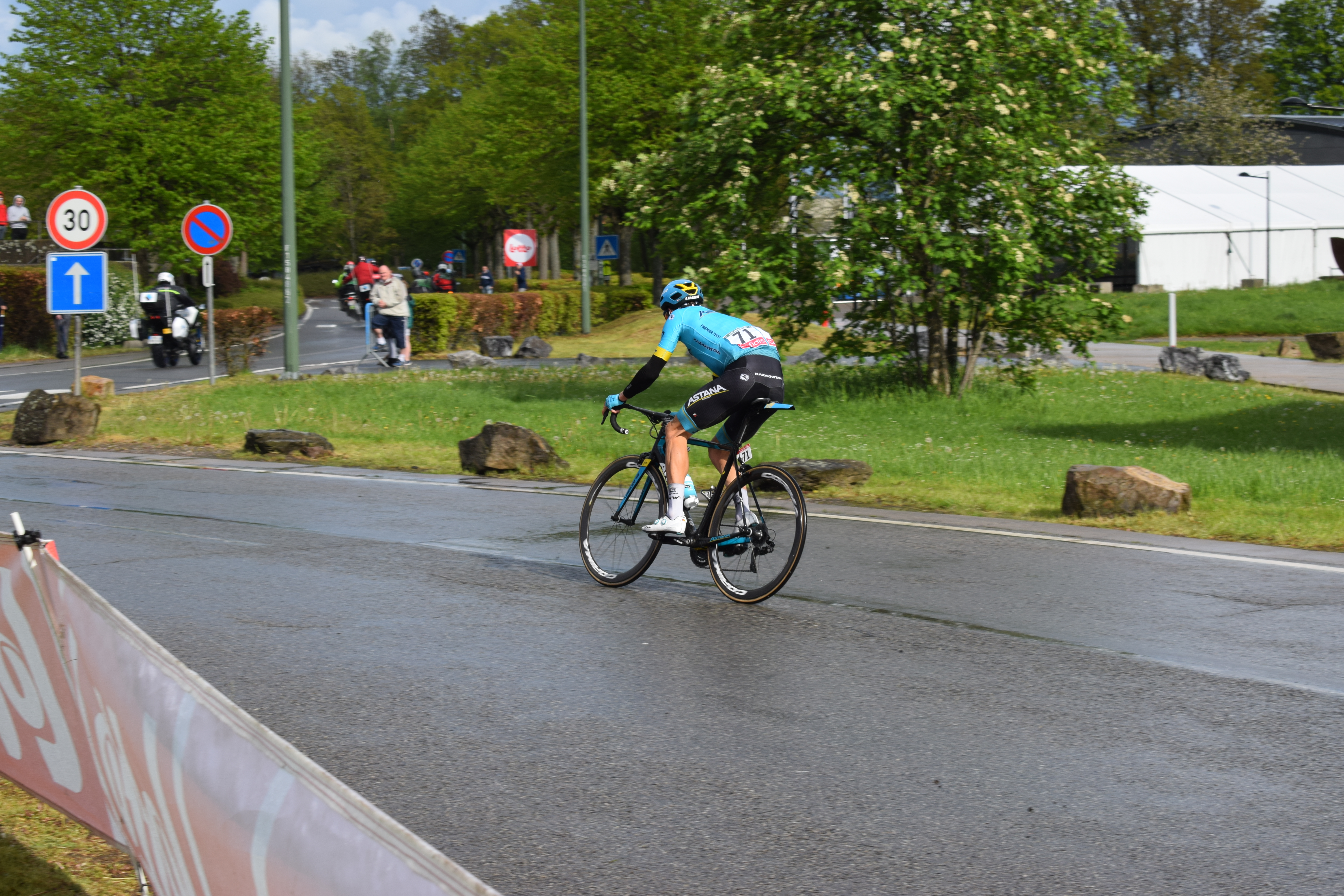 Vue du passage de la course cycliste Liège-Bastogne-Liège 2019, au rond-point Simone David-Constant, sur le campus du Sart Tilman de l'Université de Liège.